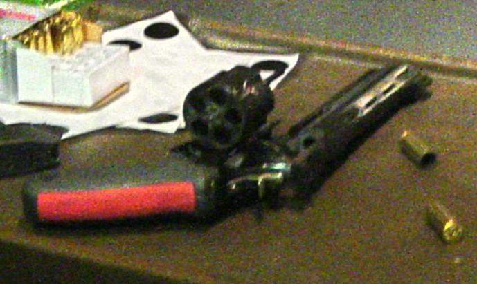 Le Taurus Raging Bull ne possède que cinq chambres (en calibre .454 Casull). Le barillet du Taurus Raging Bull ne possède que cinq chambres.